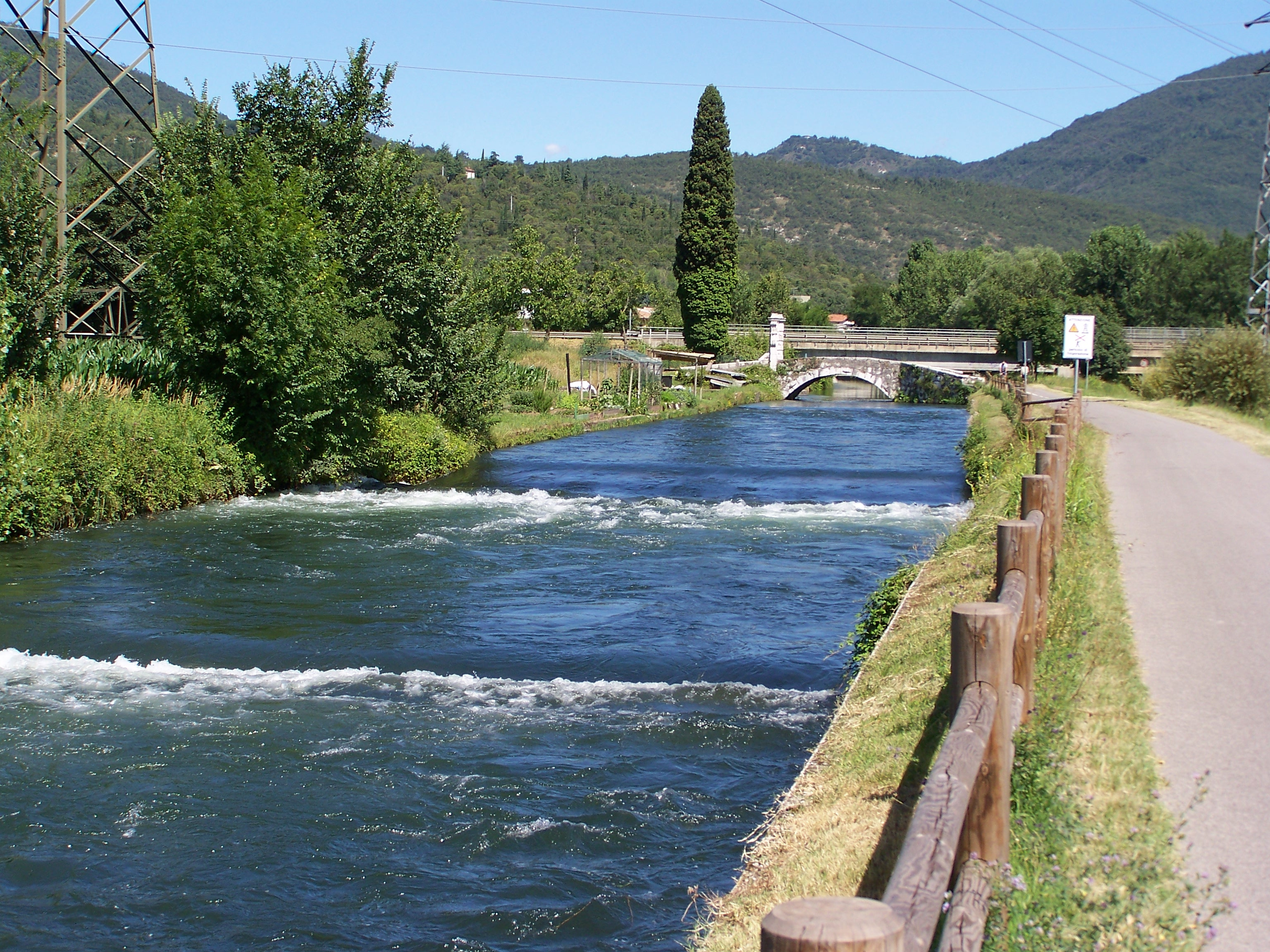 Naviglio Grande Bresciano presso il ponte ad arco di Gavardo.